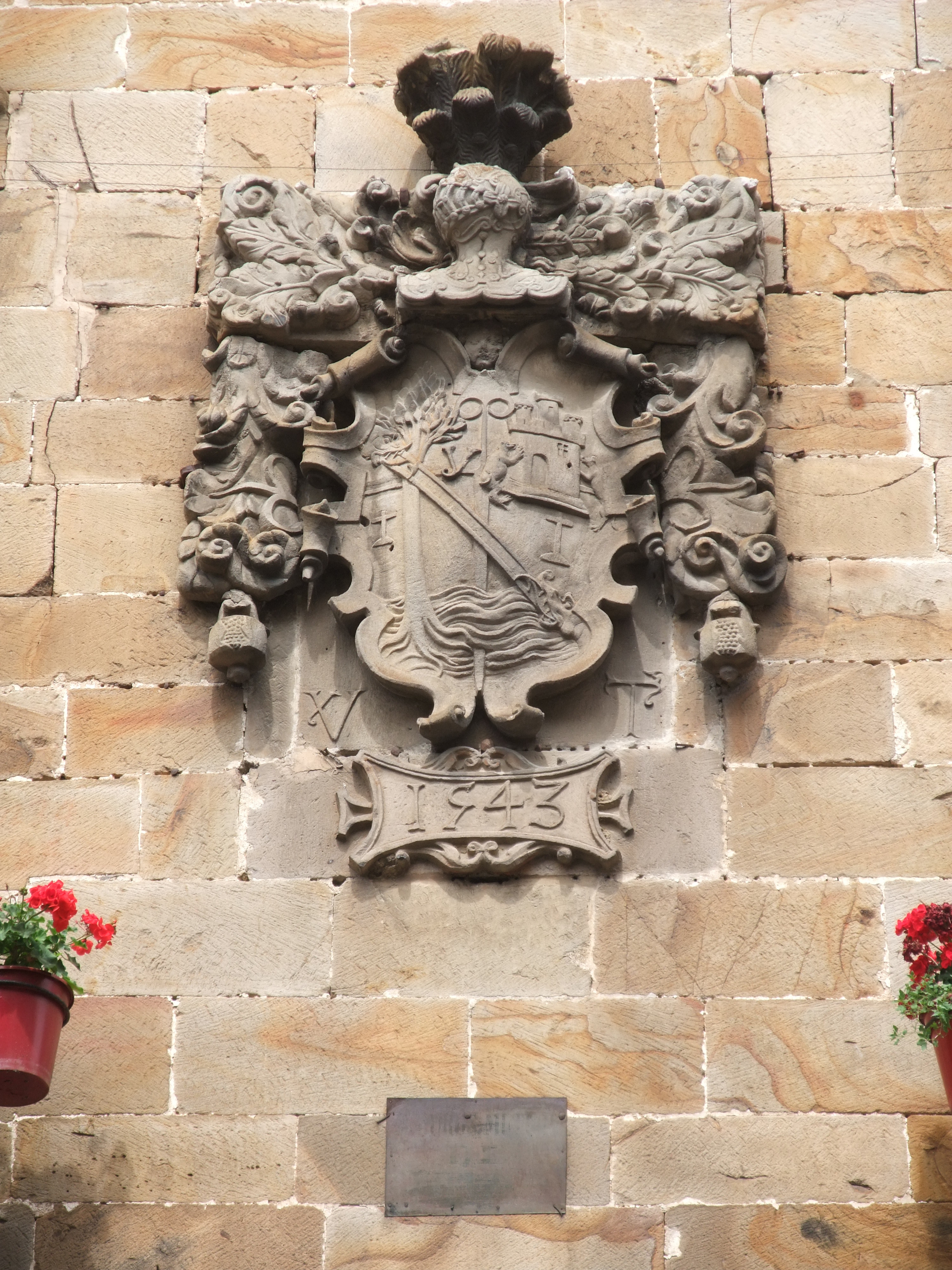 Segura (Guipúzcoa)-Palacio Balenzegi-2